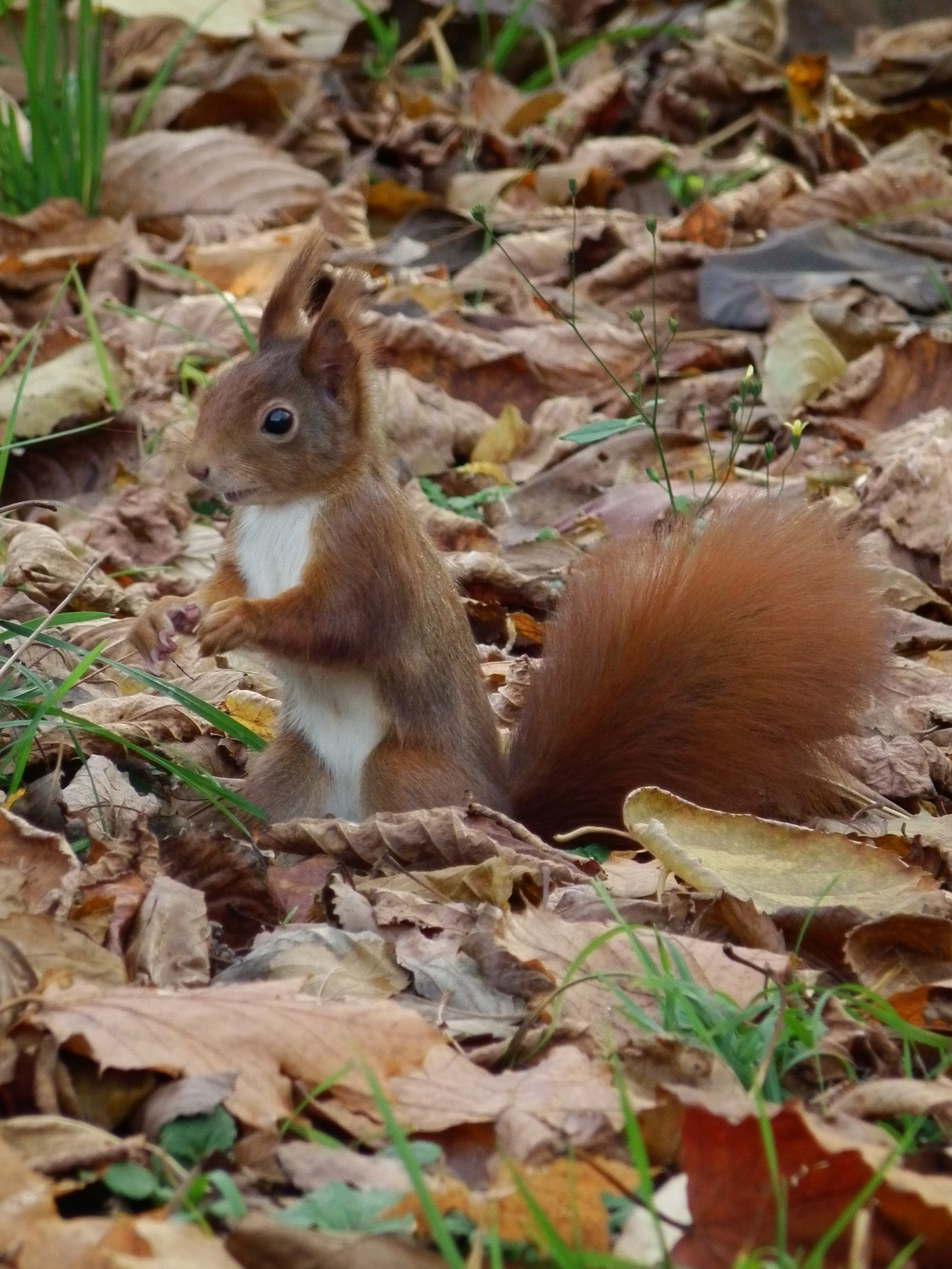 Eichhörnchen (Sciurus vulgaris), fotografiert in Heidelberg (Baden-Württemberg, Deutschland)